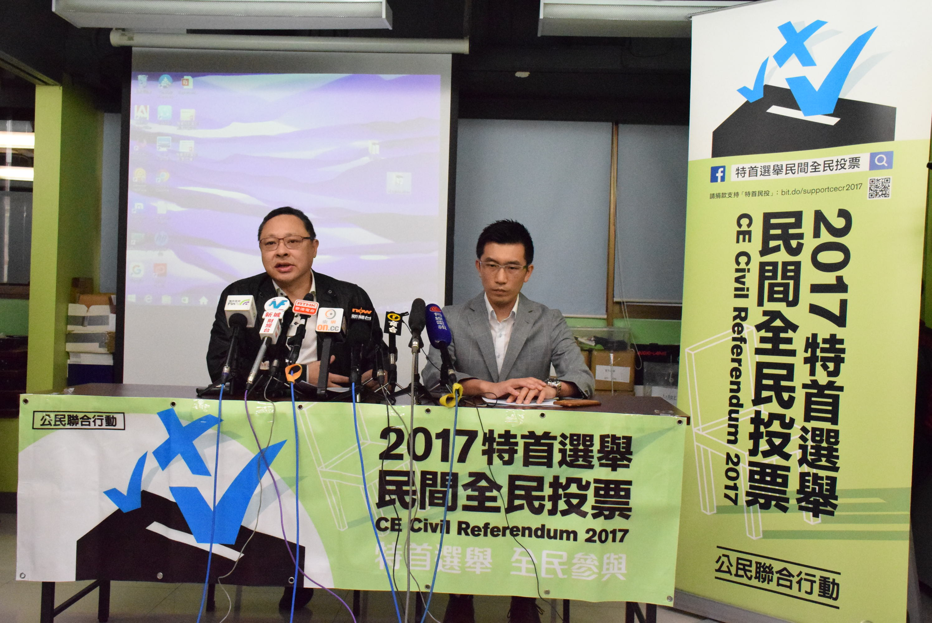 中文（香港）: 香港公民聯合行動發言人戴耀廷。(美國之音湯惠芸)